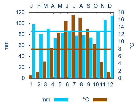 Klimadiagramm